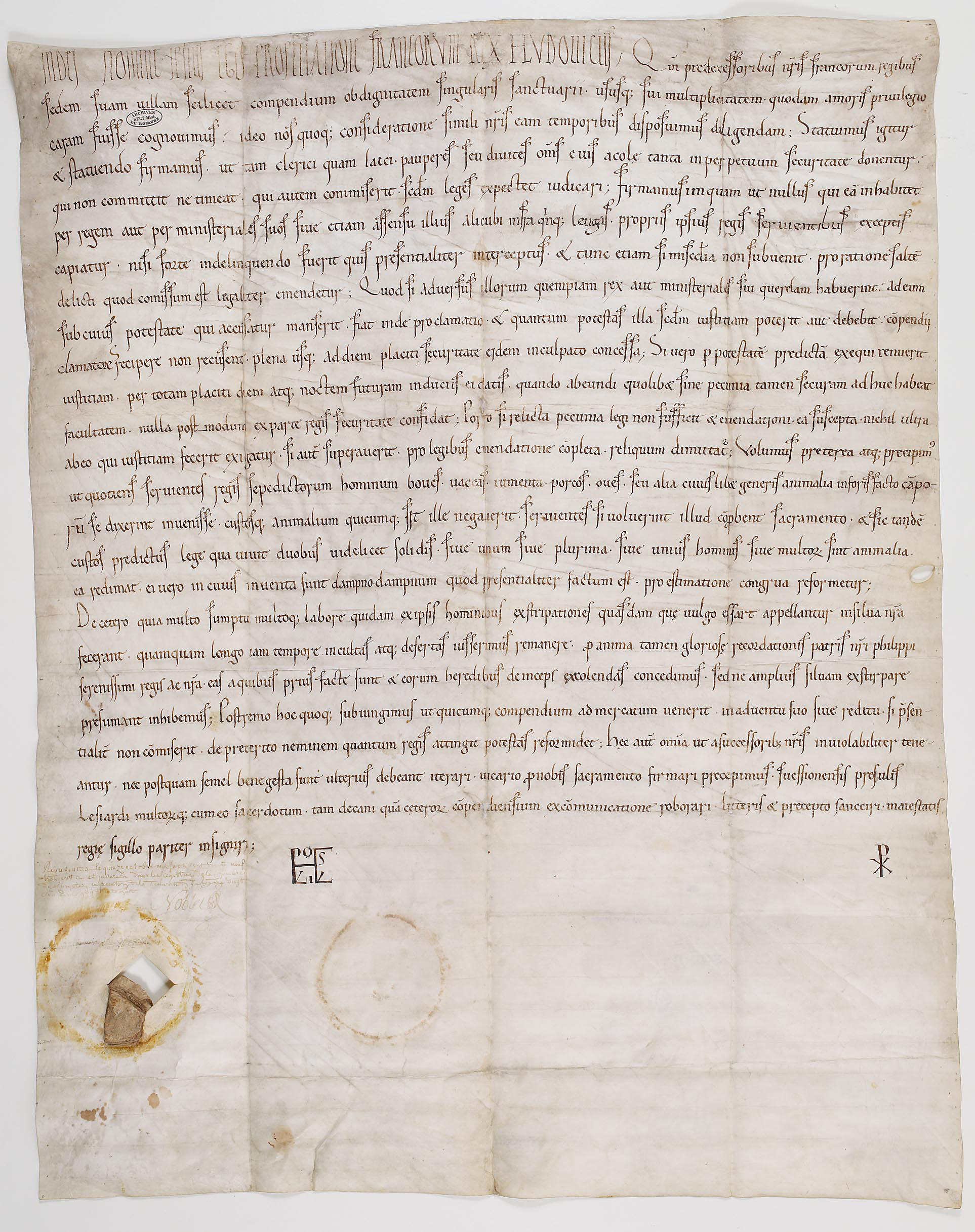 Charte du roi de France, Louis VI, accordant des privilèges aux habitants de Compiègne. Acte en latin sans date.